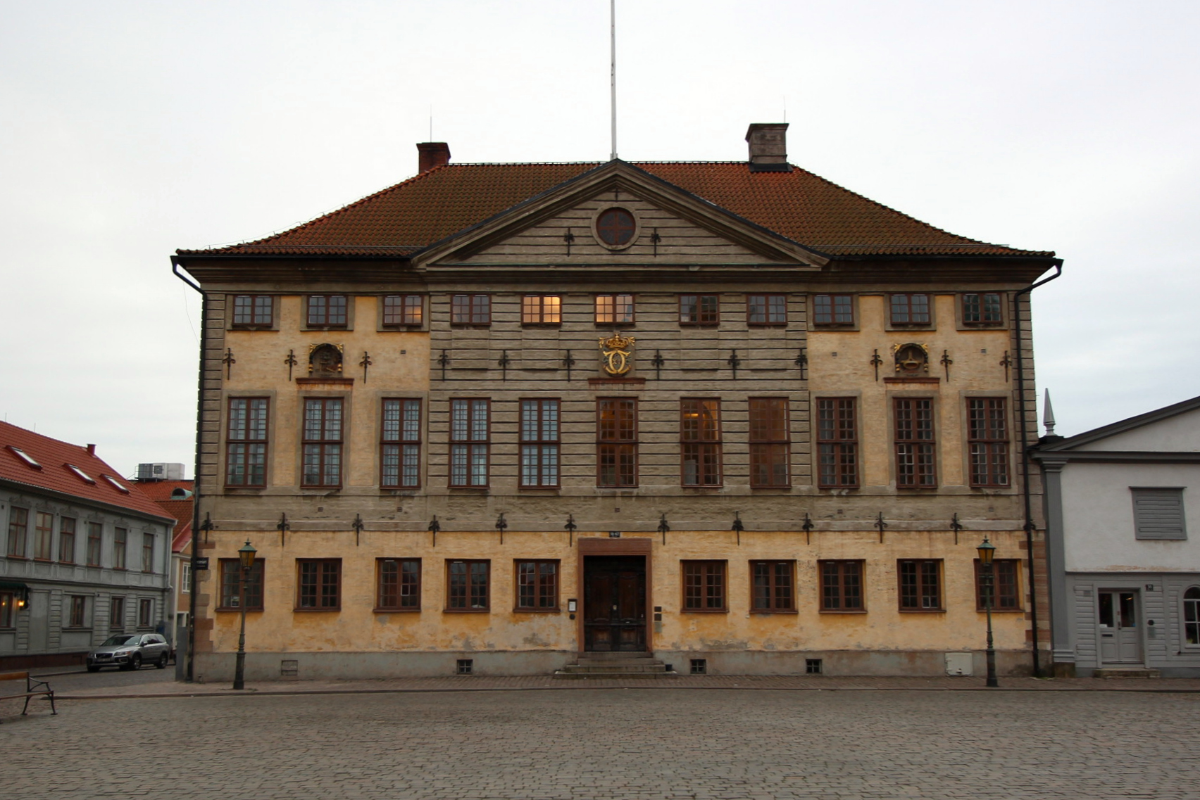 Rådhuset i Kalmar, vid Stortorget, i holländsk klassicistisk stil, färdigställdes 1690. Det ritades sannolikt av Magnus Gabriel Craelius. Byggnaden hade två flyglar, burspråk och en takryttare, vilka ödelades vid en brand 1731. Huset återställdes därefter.